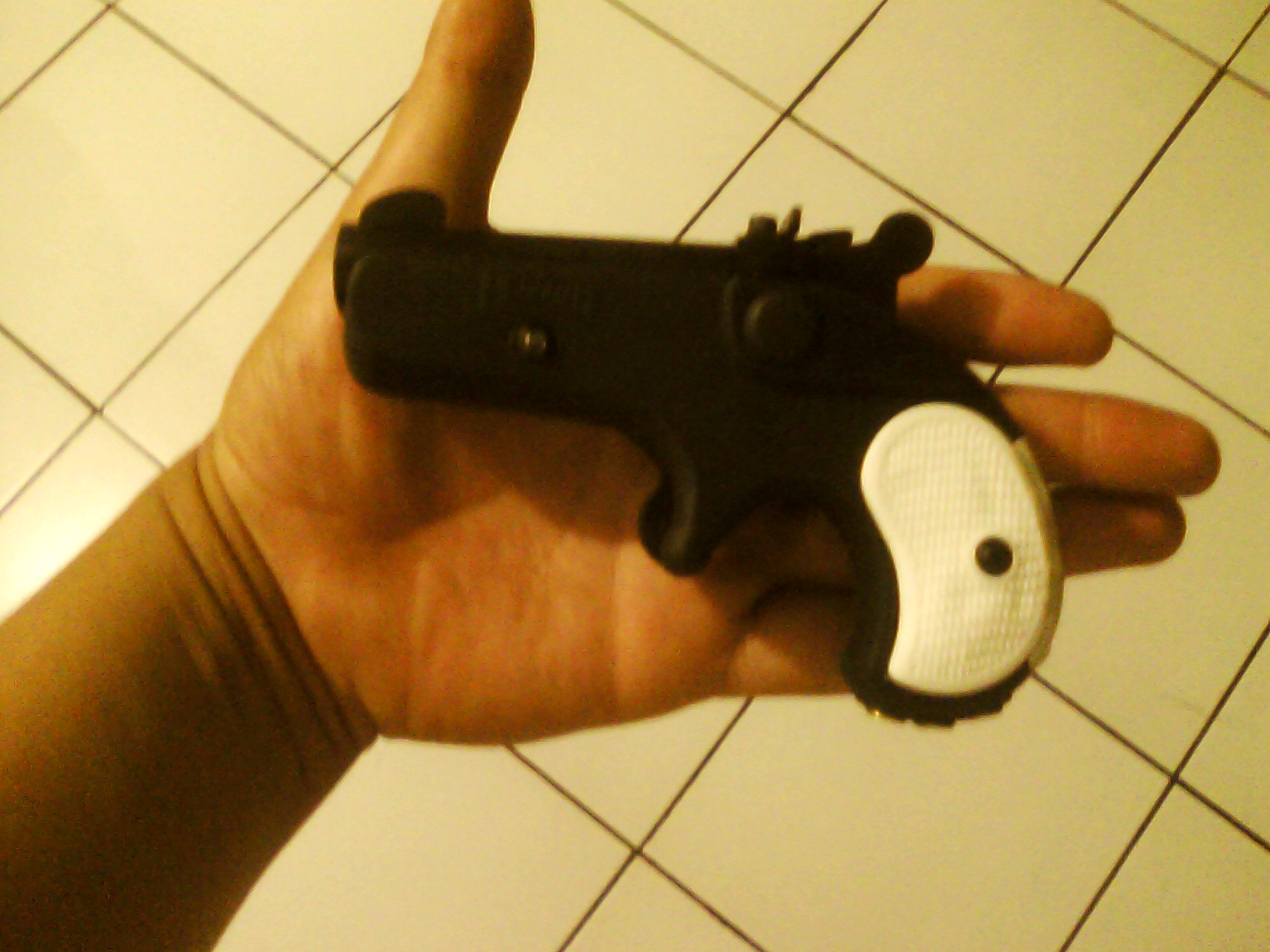 Pistola munisalva de bolsillo